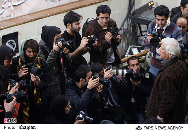 در نشست خبری فیلم وقتی همه خوابیم، بیست و هفتمین دوره‌ی جشنواره‌ی فیلم فجر